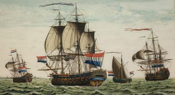 Achterglasschildering met voorstelling van het linieschip Friso. Het Schip werd tussen 1728-1730 te Harlingen gebouwd, naar Engels model.